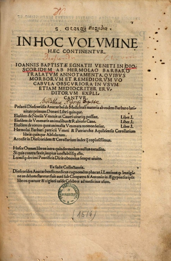 Hermolaus Barbarus, Dioscorides, Venetiis 1516, title page